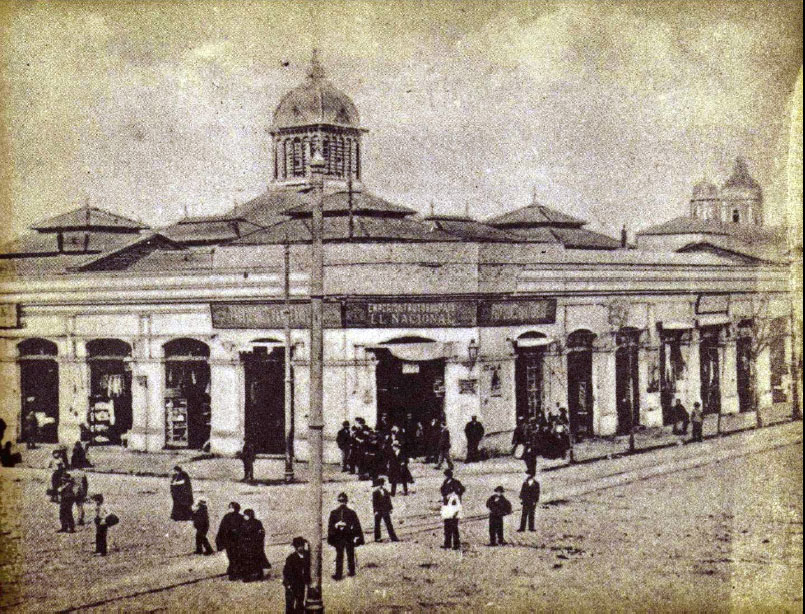 Plaza de Abastos de Santiago circa 1910.